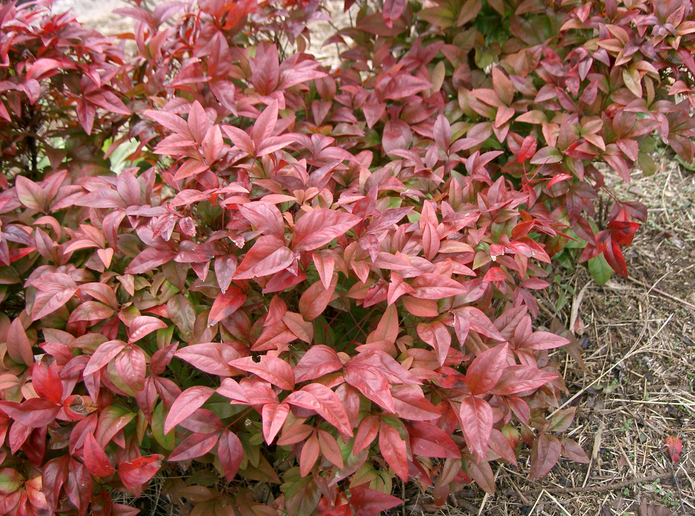 Nandina domestica cv. Otafukunanten